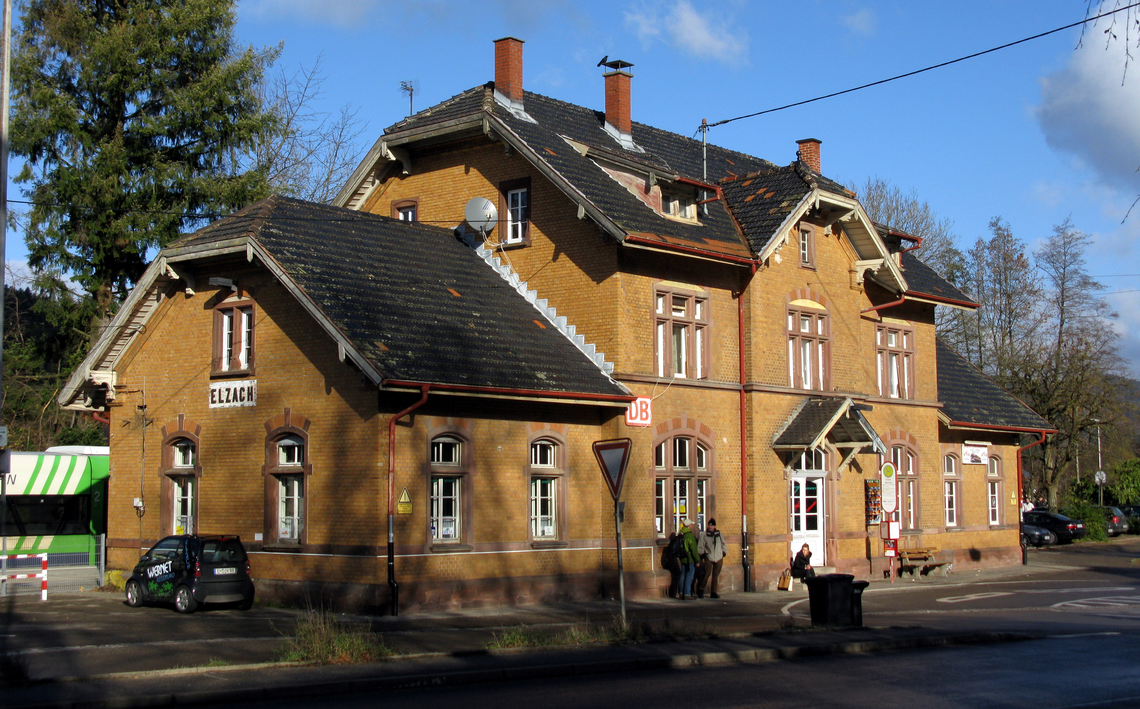 Bahnhof Elzach mit Elztalbahn